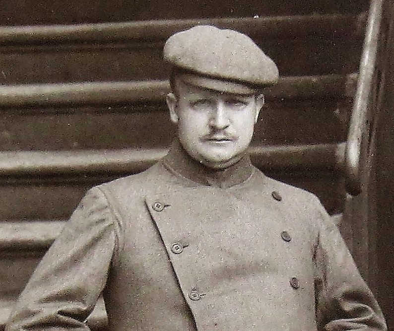 Ausschnittvergrößerung eines Fotos der fürstlichen Familie Sayn-Wittgenstein-Hohenstein mit Fokus auf August zu S-W-H., Unbekannter Fotograf, ca. 1912, Vergrößerung von Dieter Bald 2018.